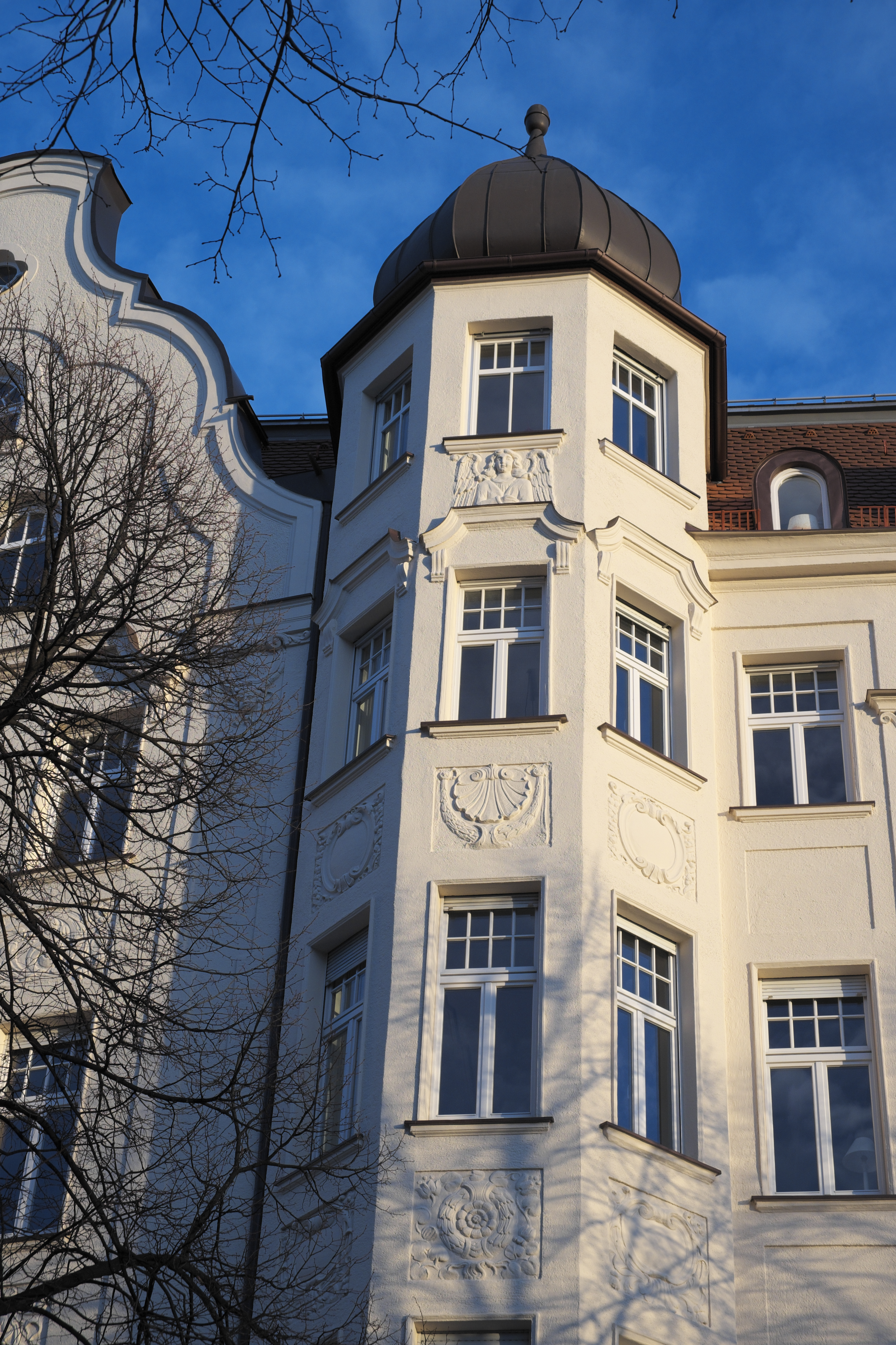 Mietshaus am Prinzregentenplatz 19 im Stadtbezirk Bogenhausen in München (Bayern/Deutschland), 1902–03 von Carl Vent erbaut